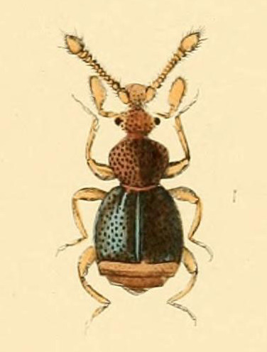 qleIPte'p^i Platte IV 126. Paederus fuscipes 127. Stenus kirbii 128. Rugilus fragilis 129. Falagria thoracica 130. Bryaxis sulcicollis 131. Arcopagus puncticollis 132. Holoparamecus depressus 133. Latridrus elongatus 134. Paramecosoma bicolor